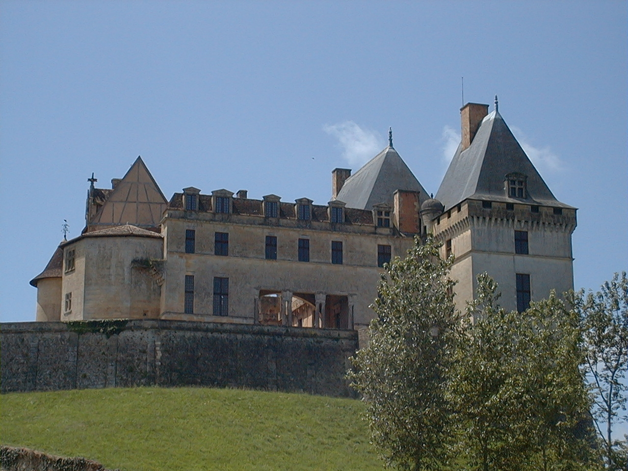 Château de Biron en Dordogne-périgord This building is en partie classé, en partie inscrit au titre des Monuments Historiques.